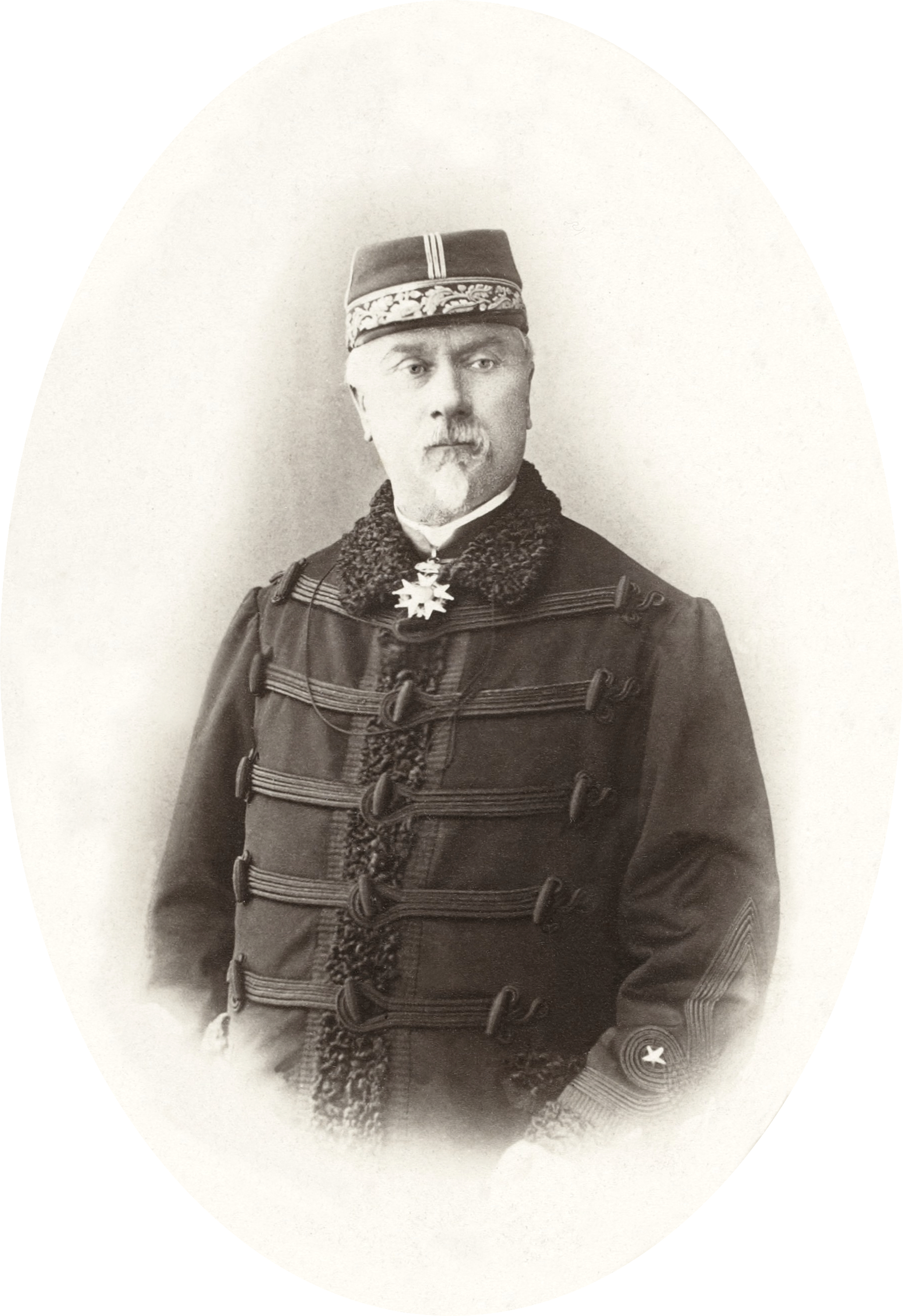 Adolphe Hanoteau (1814 - 1897), général français, linguiste, auteur d'études sur les Kabyles.